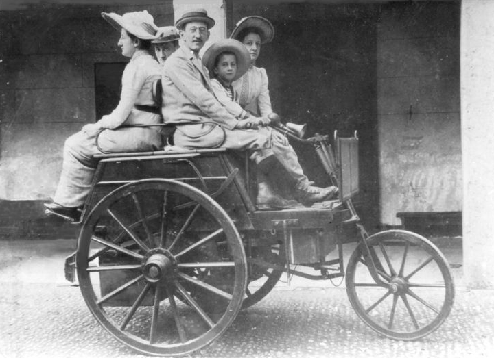 Véhicule Audibert et Lavirotte : modèle Tricycle à pétrole.